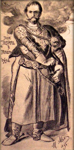 Mikoláš Aleš - Jan Jiskra z Brandýsa